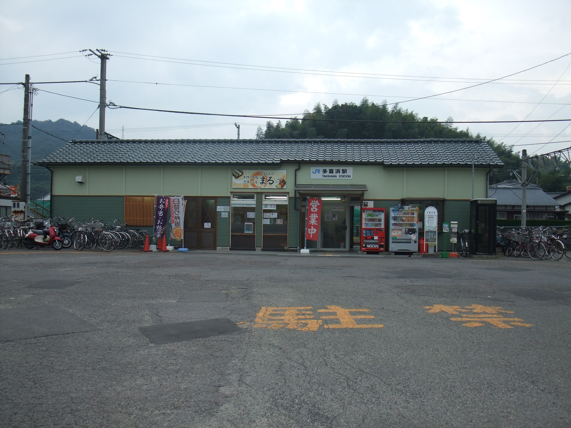 予讃線多喜浜駅